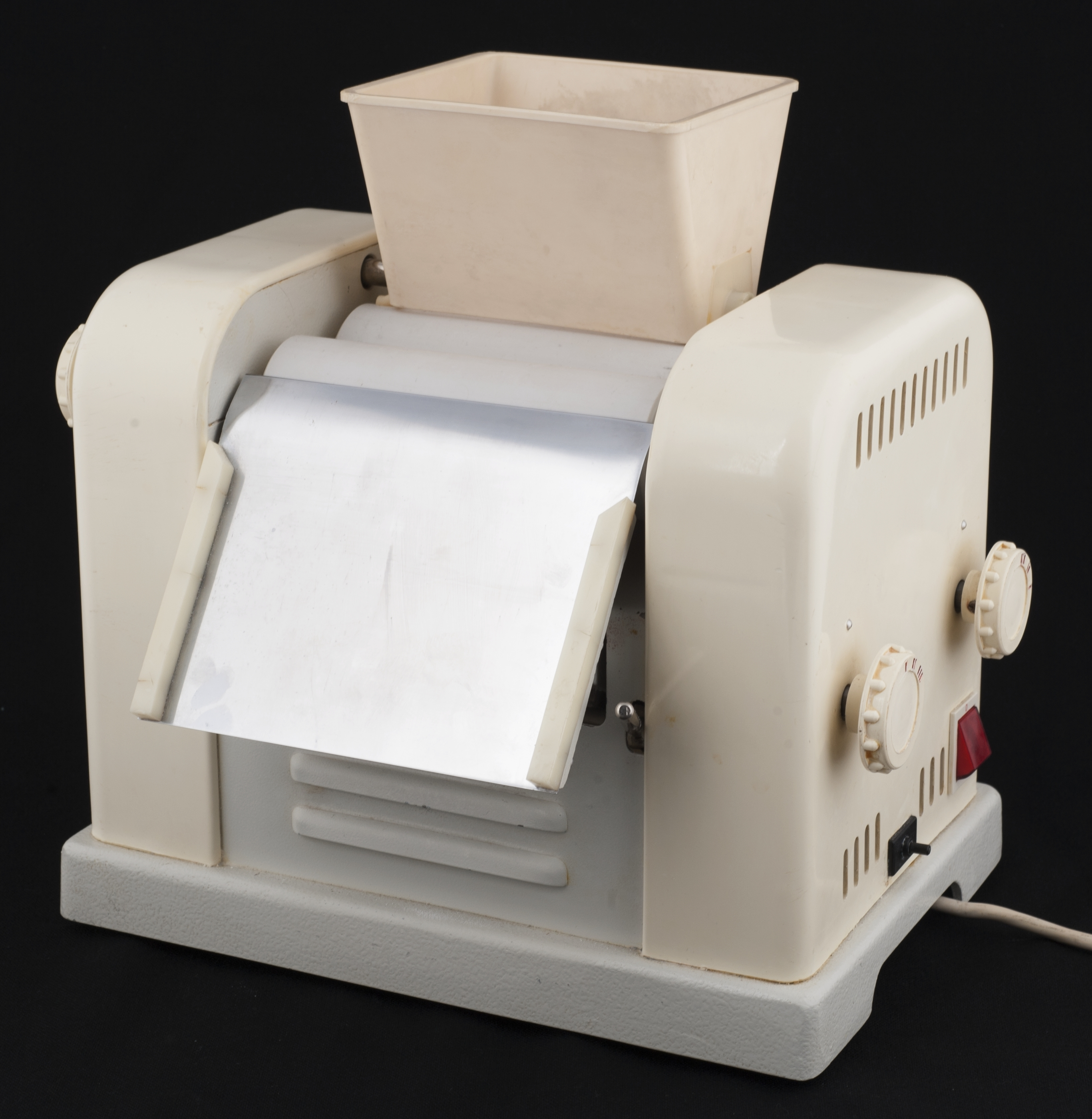 Salvemølle. Elektrisk salvemølle med tre valser og avskrapningsbrett.